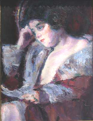 Photo d'un tableau ("Femme à la lettre" par Léon Gard) dont je suis le propriétaire et l'ayant droit.